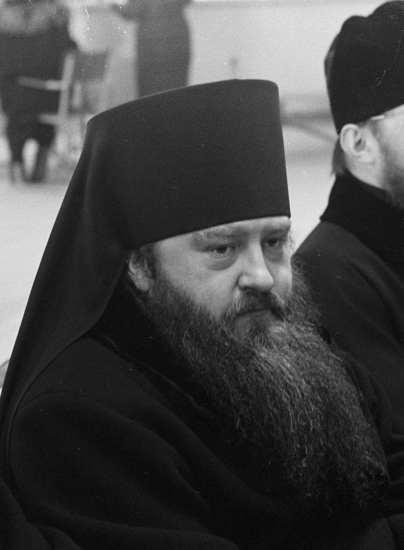 Russische kerkleiders op Schiphol op doorreis Amerika, tweede van links Aartsbisschop Nicodiem